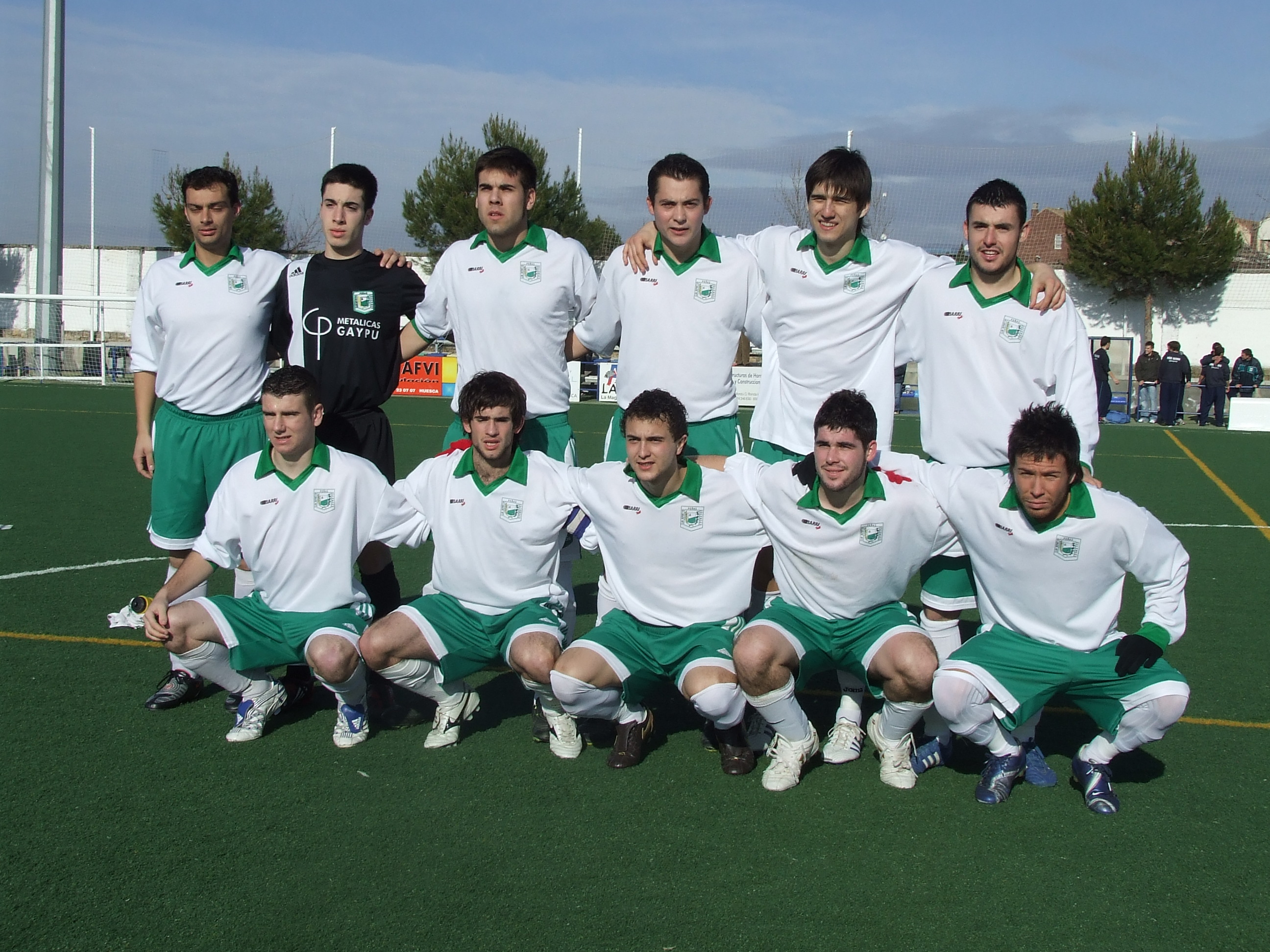 Peñas Oscenses (Peñas Oscenses 3 - Altorricón 2 (18-01-2009))